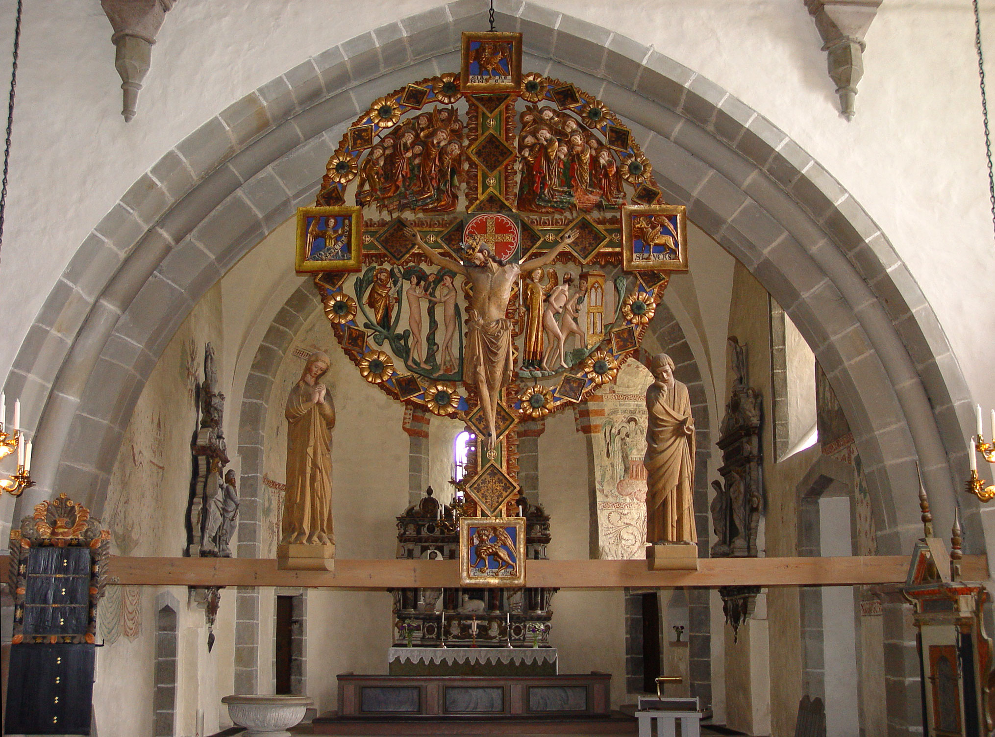 Öja kyrka auf Gotland. Triumphkruzifix (spätes 13.Jh.)